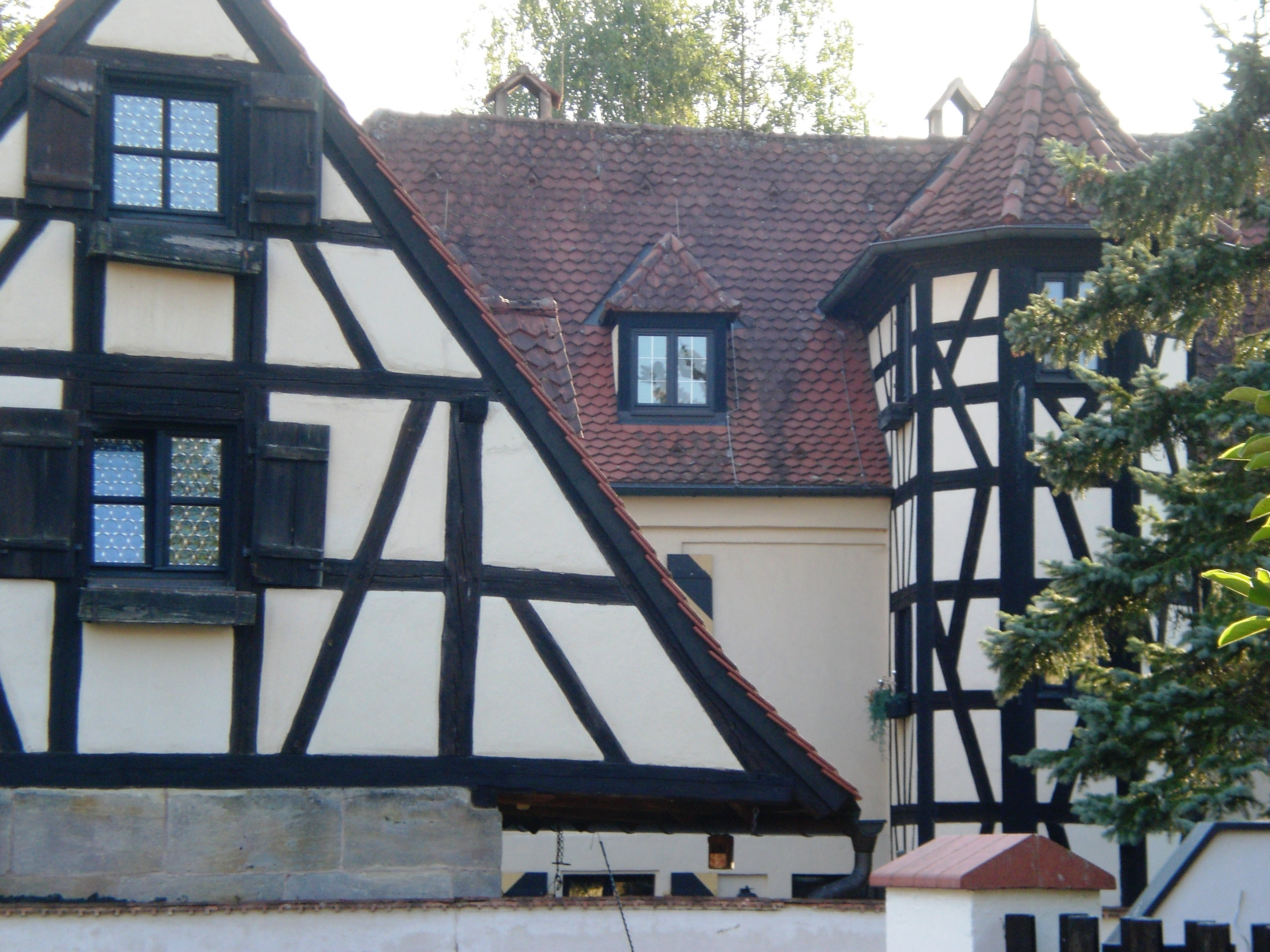 Herrensitz Birnthon